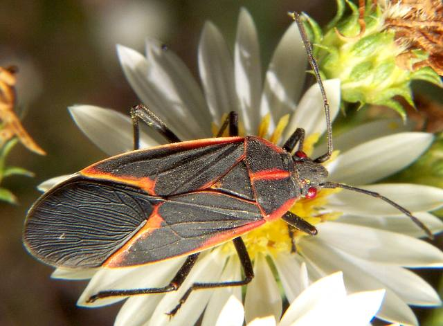 Adult Box Elder Bug